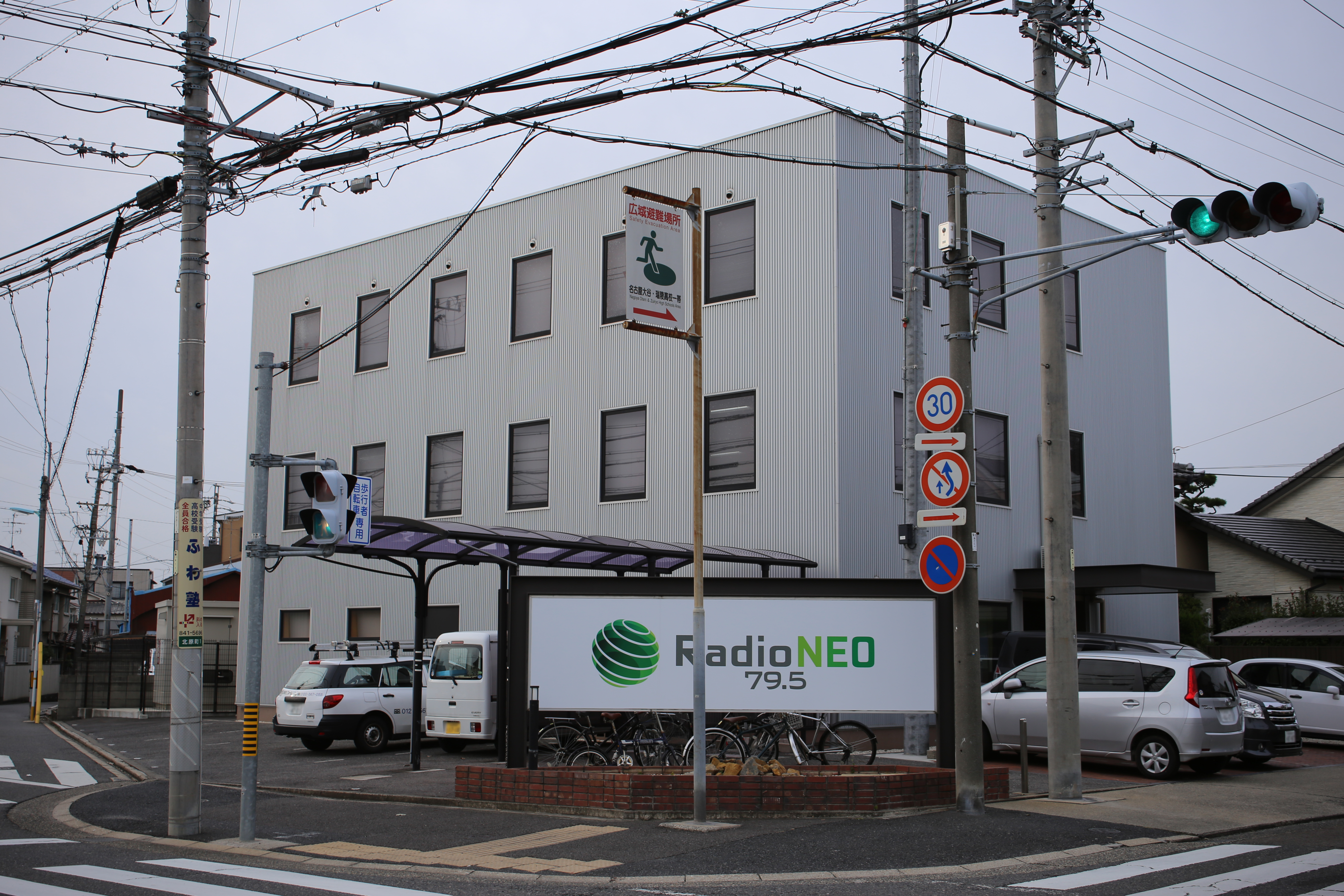 名古屋市瑞穂区北原町一丁目のRadio NEOを南側公道東側より撮影。ただし、ナンバープレートにつき画像処理済。